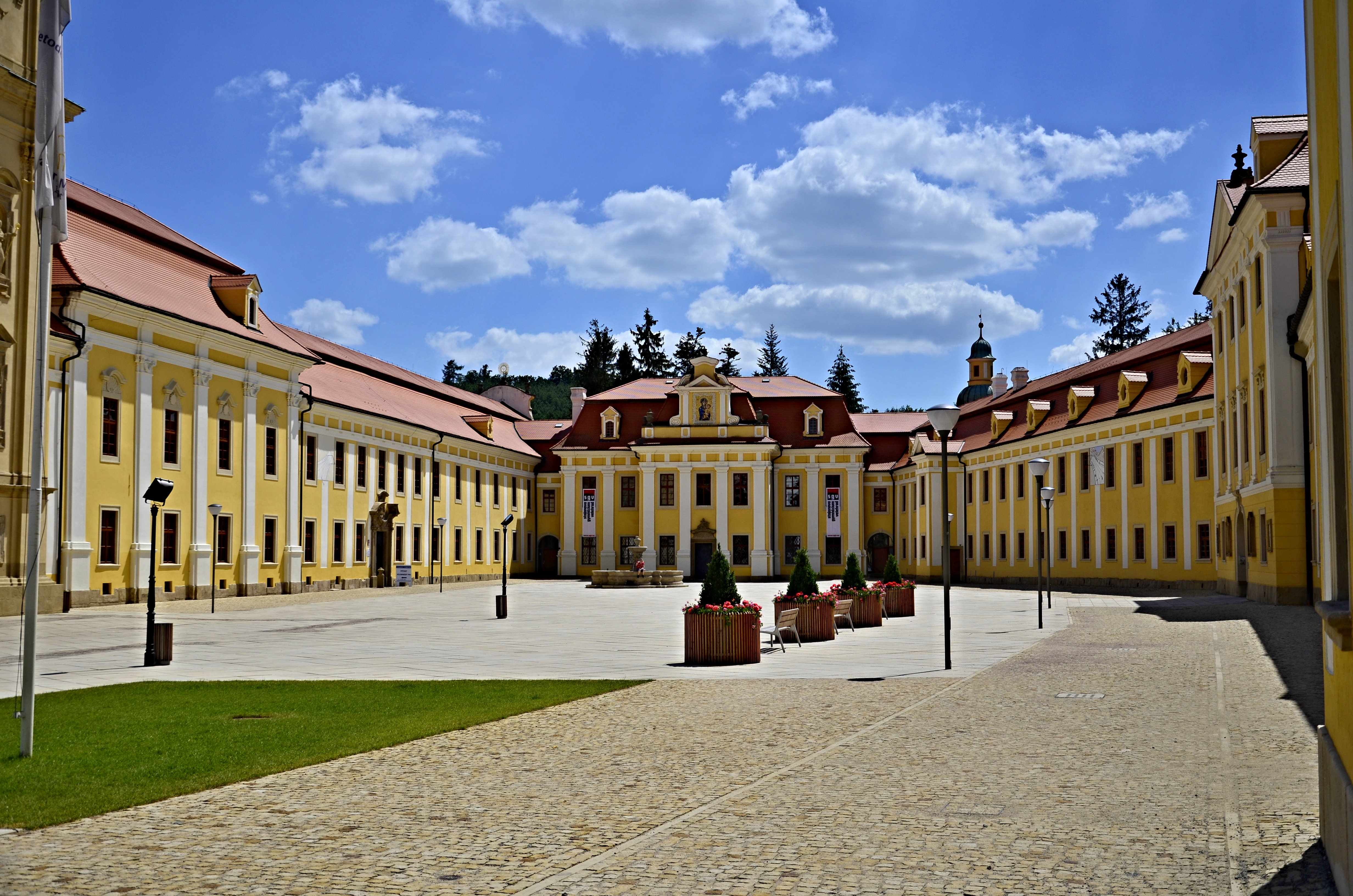 Klášter cisterciáků (Velehrad), Velehrad 1